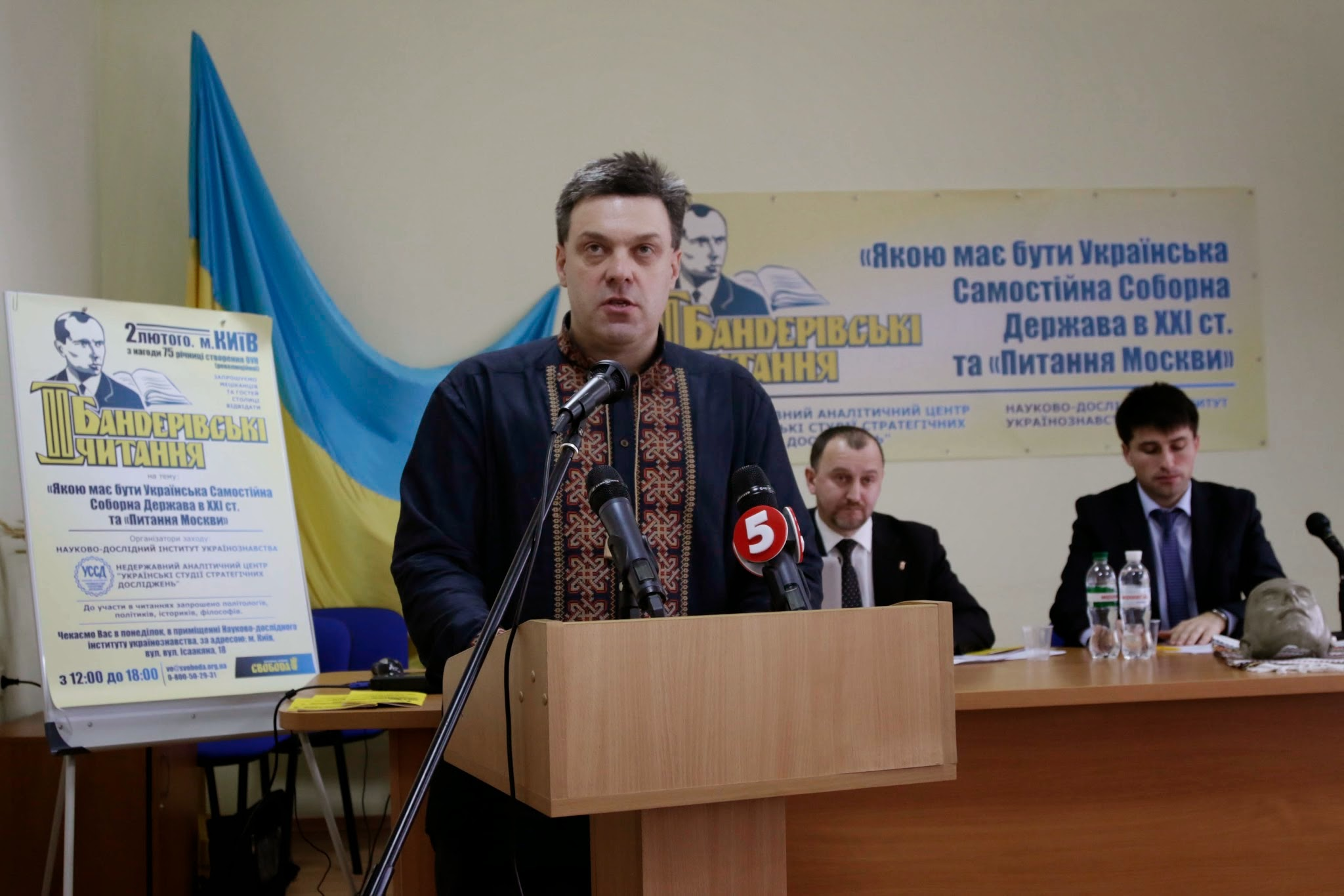 Лідер Всеукраїнського об'єднання "Свобода" Олег Тягнибок на читаннях.